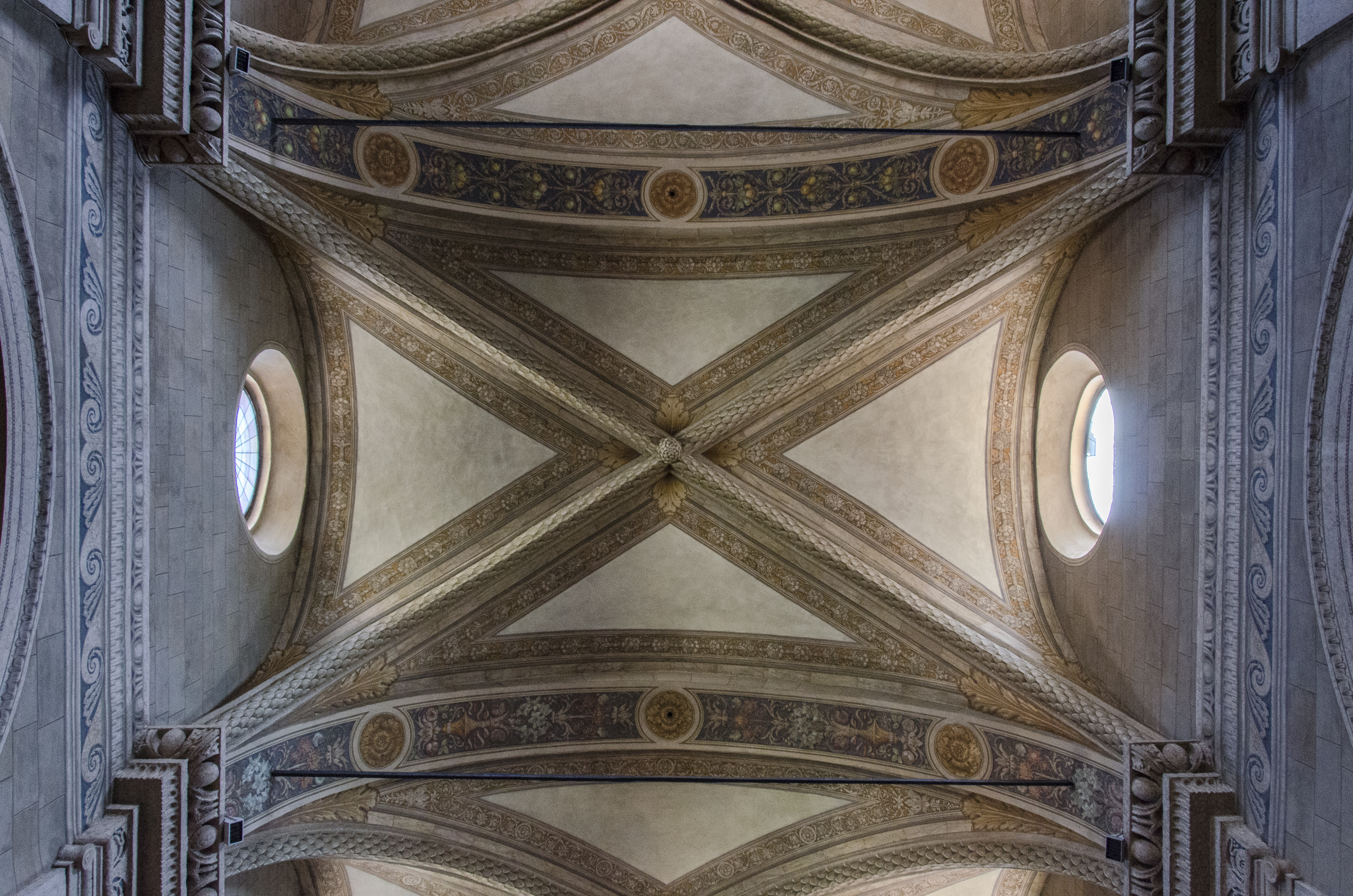 Chiesa dei Santi Nazaro e Celso a Verona. Interno, in stile rinascimentale.